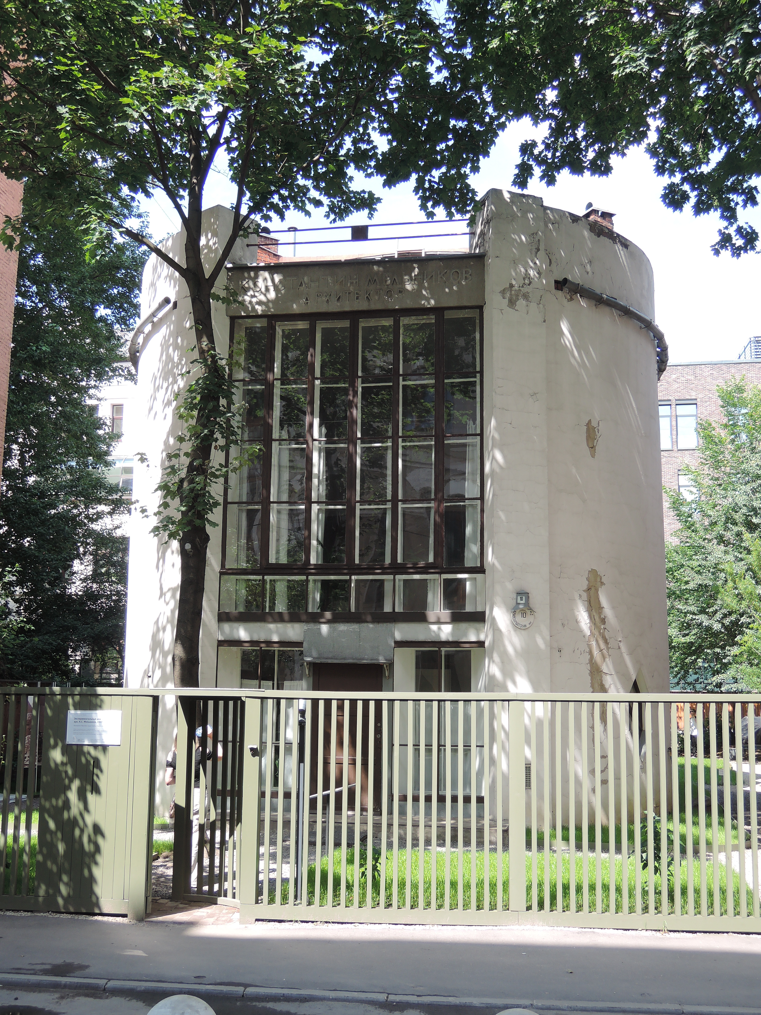 Dům architekta Konstantina Melnikova